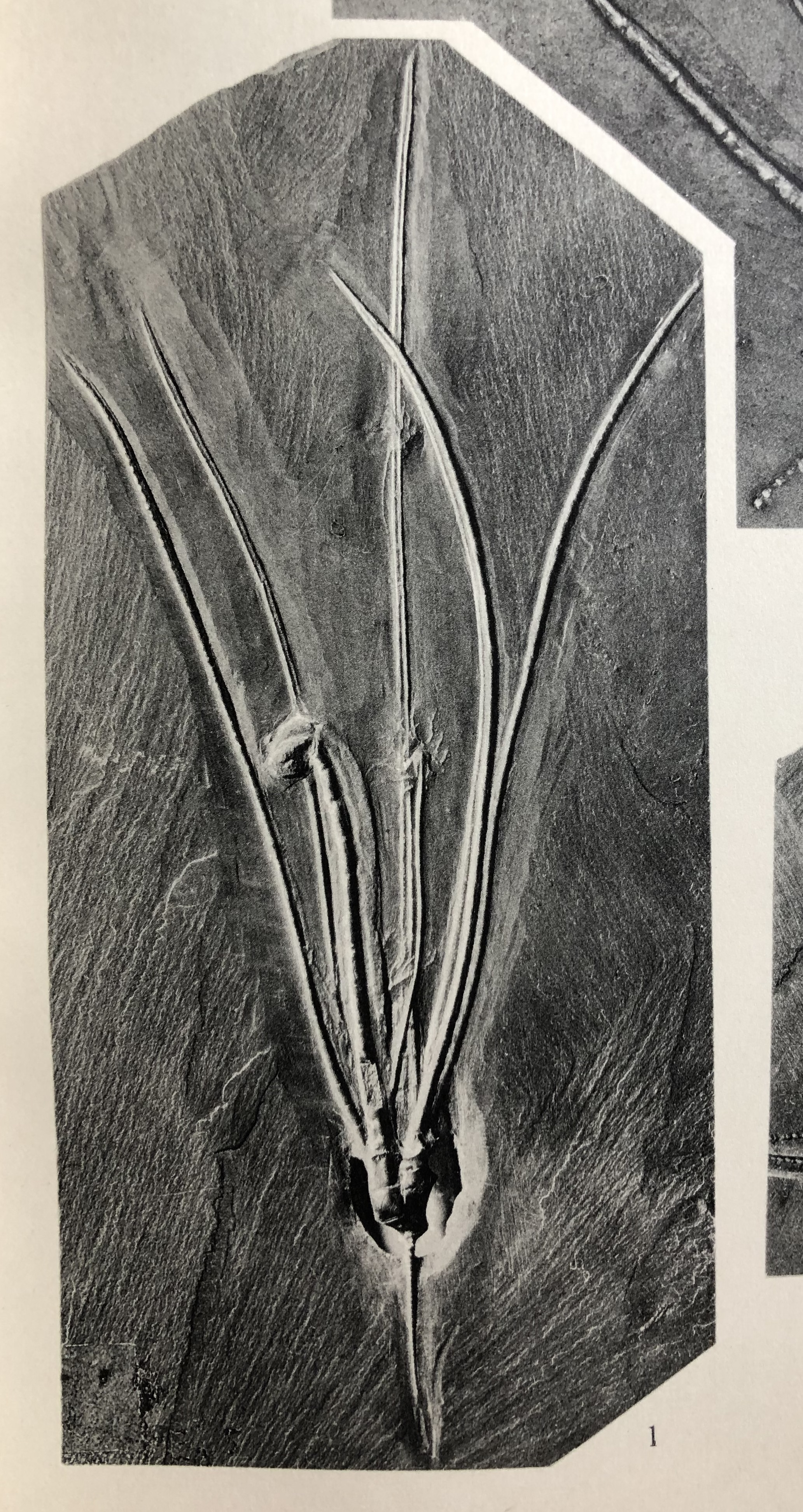 Senariocrinus maucheri holotyp Schmidt, E. 1934. Die Crinoideen des Rheinischen Devons. 1. Teil. Die Crinoideen des Hunsrückschiefers. Abhandlungden der Preußischen Geologischen Landesanstalt. Neue Folge. Heft 163. Tafel 1, Figur 1.